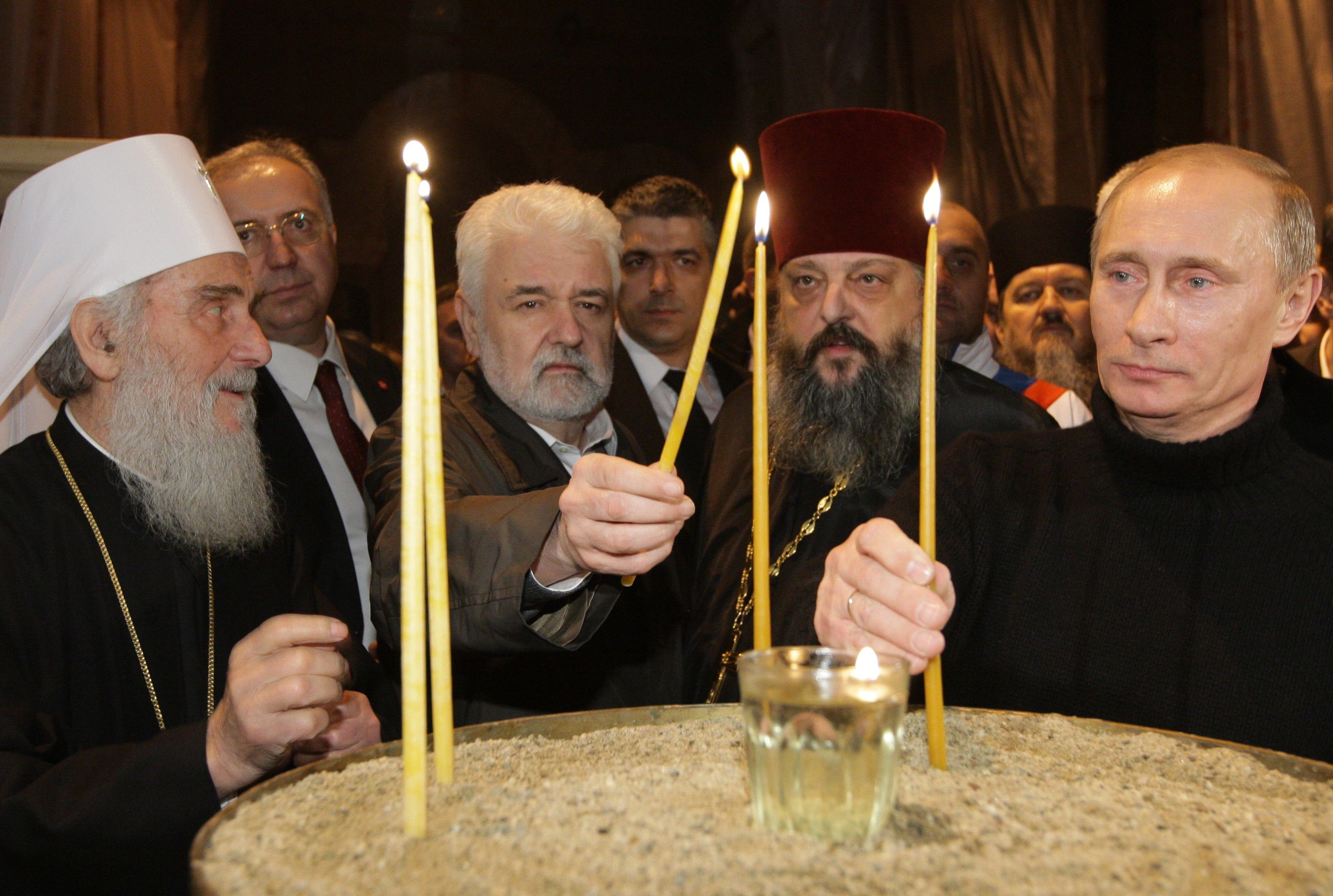 В.В.Путин посетил в Белграде храм Святого Саввы, где ему вручили высшую награду Сербской православной церкви